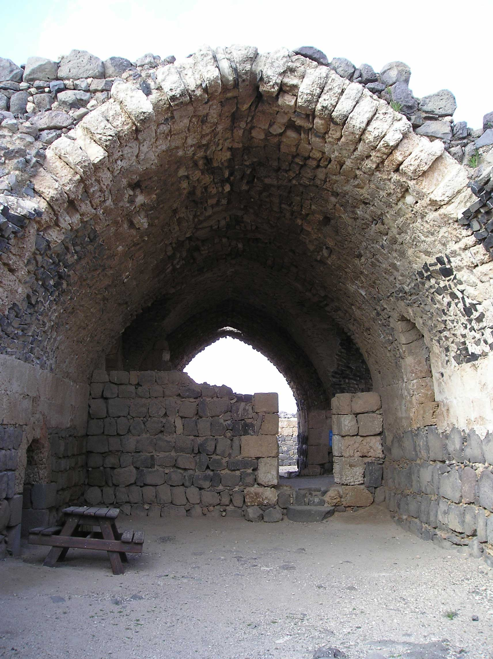 Kohav Hayarden - twierdza krzyżowców Belvoir. Teren izraelskiego parku narodowego. Sklepienie zabudowań wewnętrznej fortecy. Zdjęcie wykonał A. Sobkowski - marzec 2006.